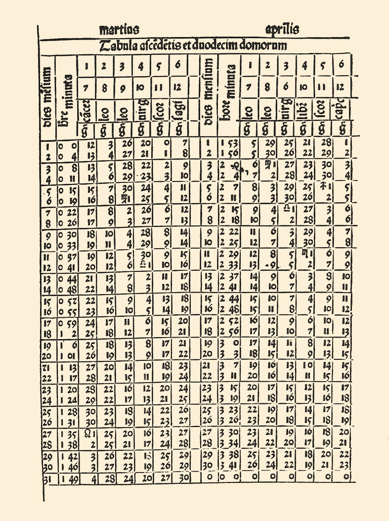 Tabla astronómica de Almanach Perpetuum, obra de Abraham Zacut sobre astronomía